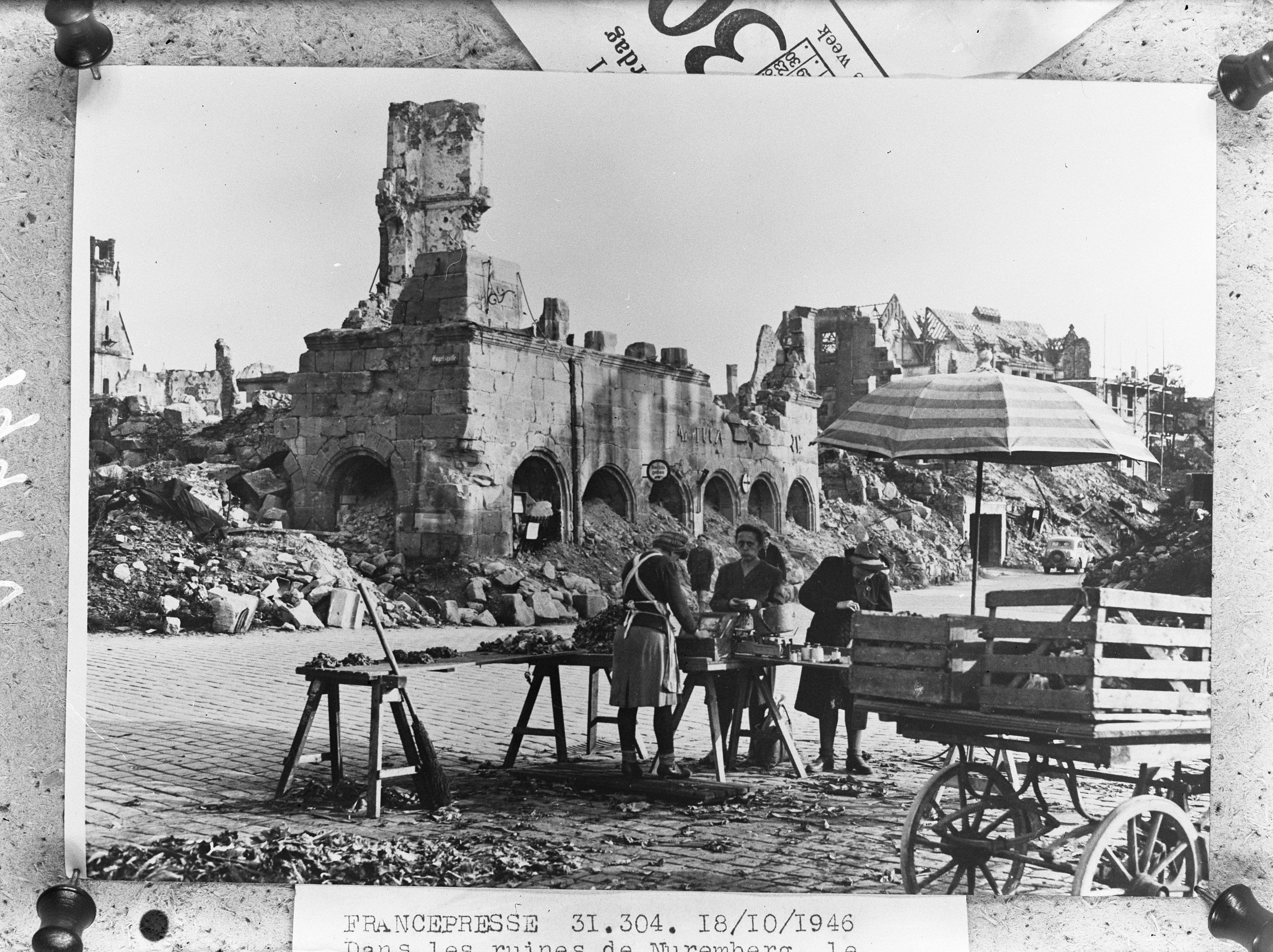 Collectie / Archief : Fotocollectie Anefo Reportage / Serie : [ onbekend ] Beschrijving : Markt in het vernielde Neurenberg Datum : 21 oktober 1946 Locatie : Duitsland, Nurnberg Trefwoorden : markten Fotograaf : Agence France Presse (AFP) Auteursrechthebbende : Nationaal Archief Materiaalsoort : Glasnegatief Nummer archiefinventaris : bekijk toegang 2.24.01.09 Bestanddeelnummer : 901-9446